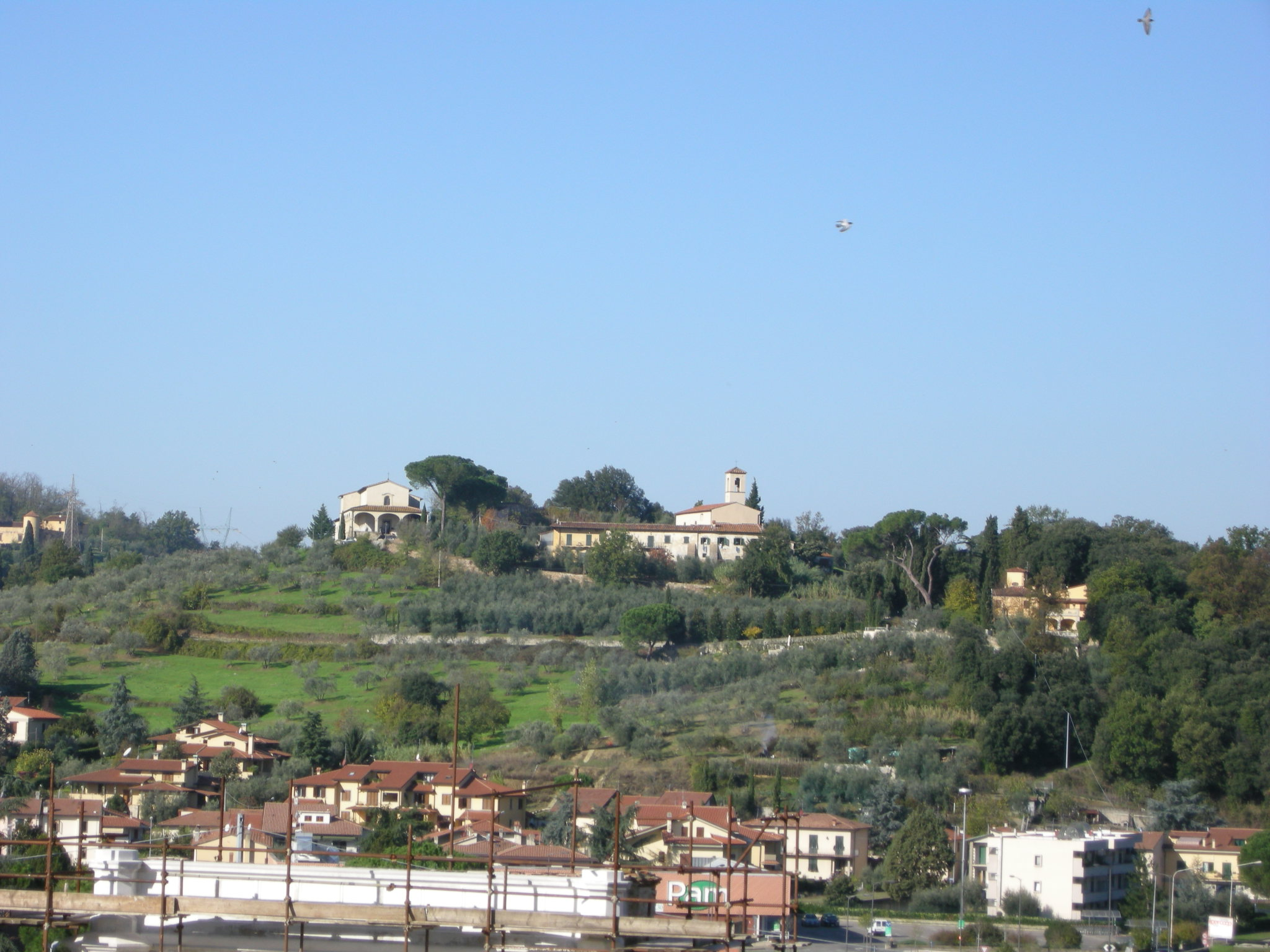 Bonistallo